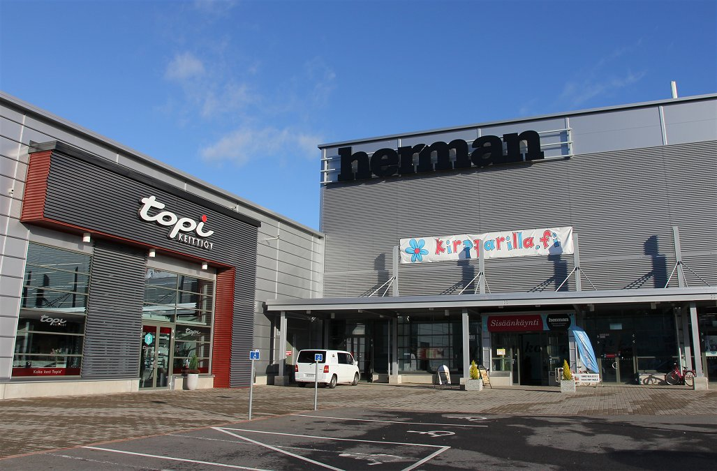 Kauppapaikka Herman on vuonna 2012 valmistunut kauppakeskus Kuopiossa Leväsen kaupunginosassa. Katuosoite on Leväsentie 2.